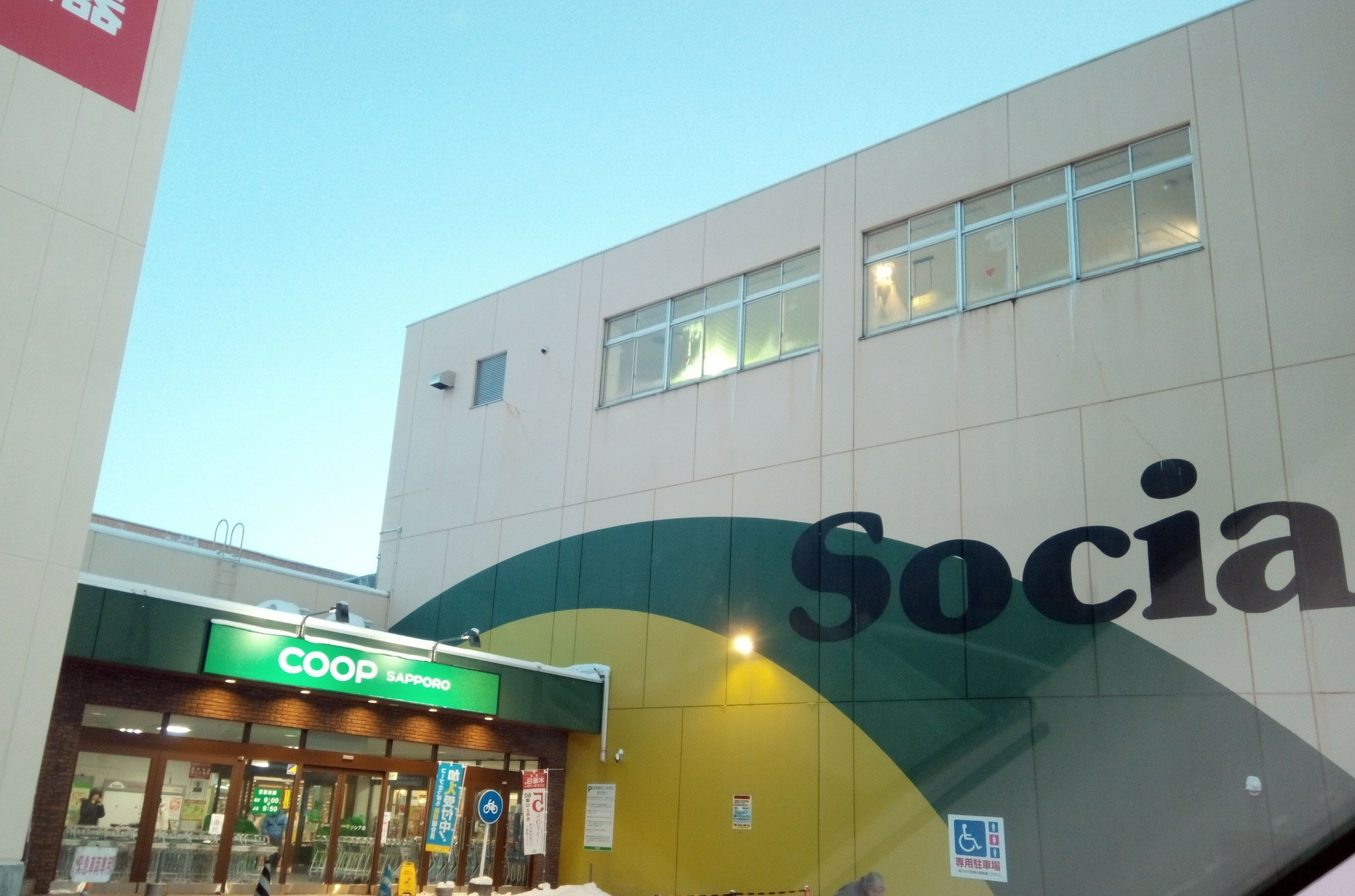 コープさっぽろソシア店外観